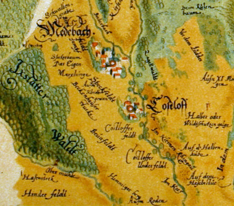 Landtafel der Herrschaft Eppstein, nördliche Hälfte. Entstanden 1607/09. Gr. 34.2 × 49.9 cm. Ohne Titel. Maßstab 1 : 23400.